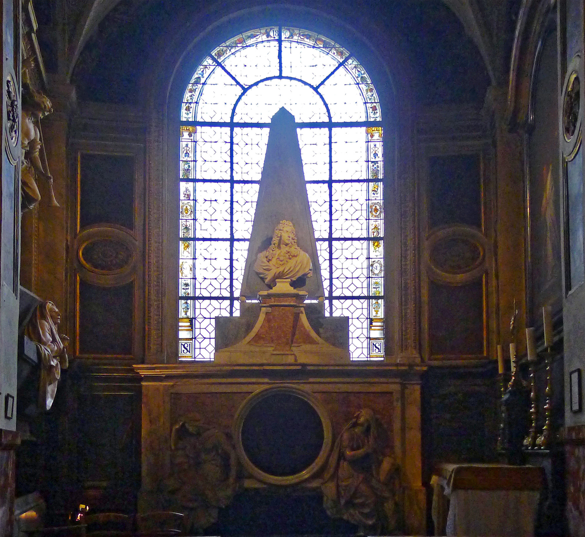 Église Saint-Nicolas-du-Chardonnet (tombe de Charles Le Brun) - Paris V